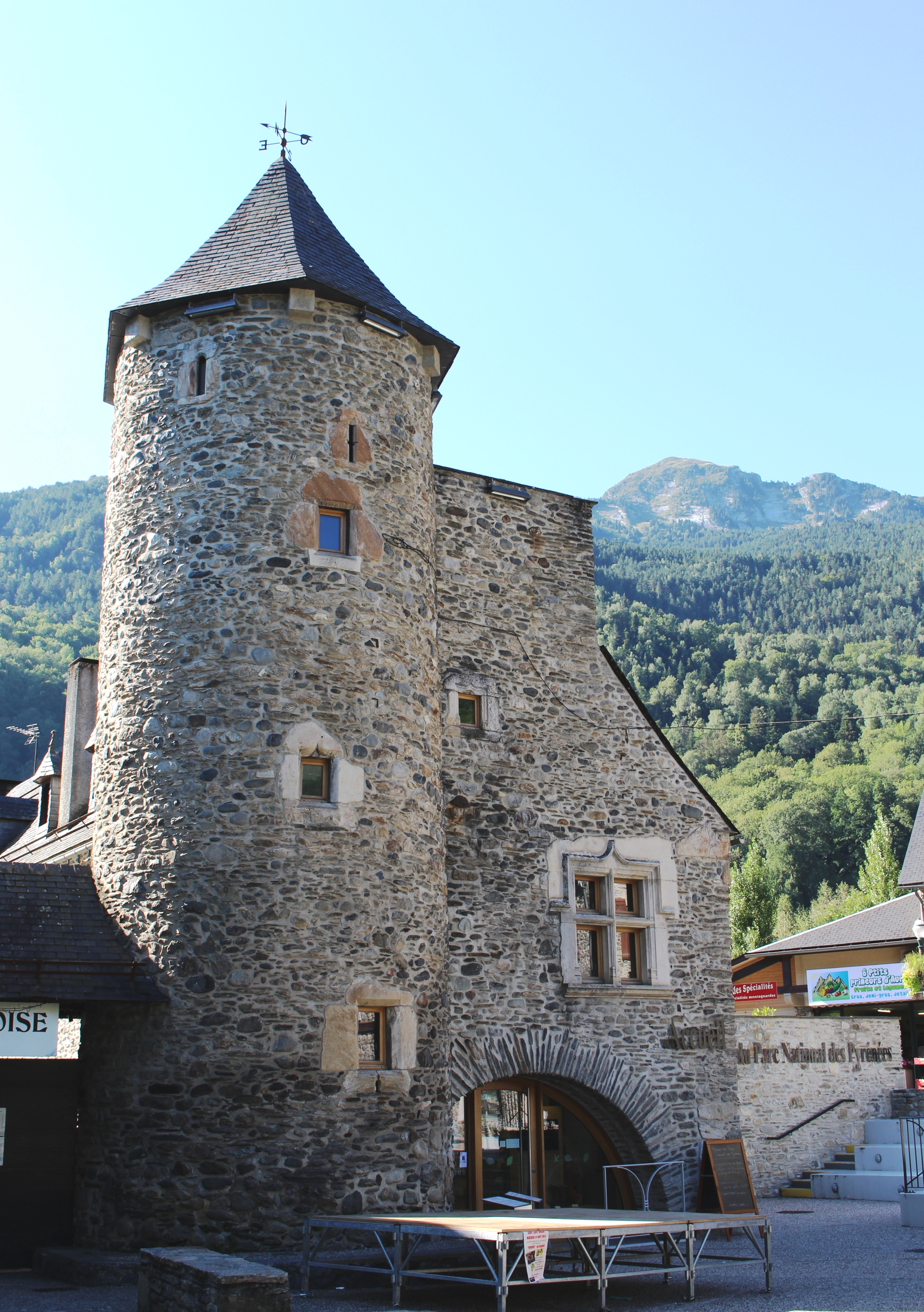 La tour Hachan de Saint-Lary-Soulan (Hautes-Pyrénées)